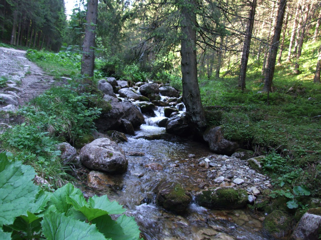 Małołącki Potok